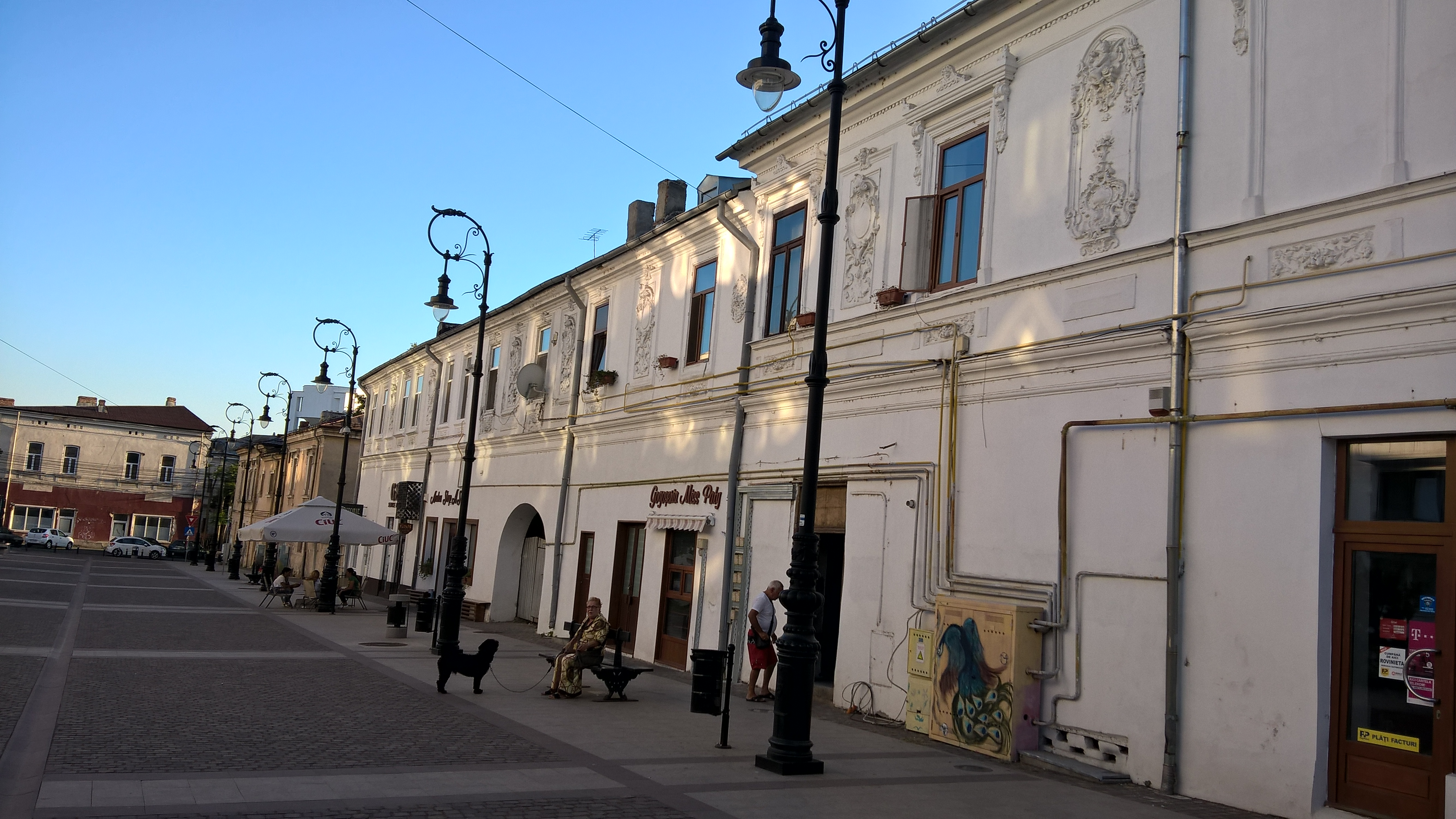 Casă Centrul Vechi,str.T.Aman